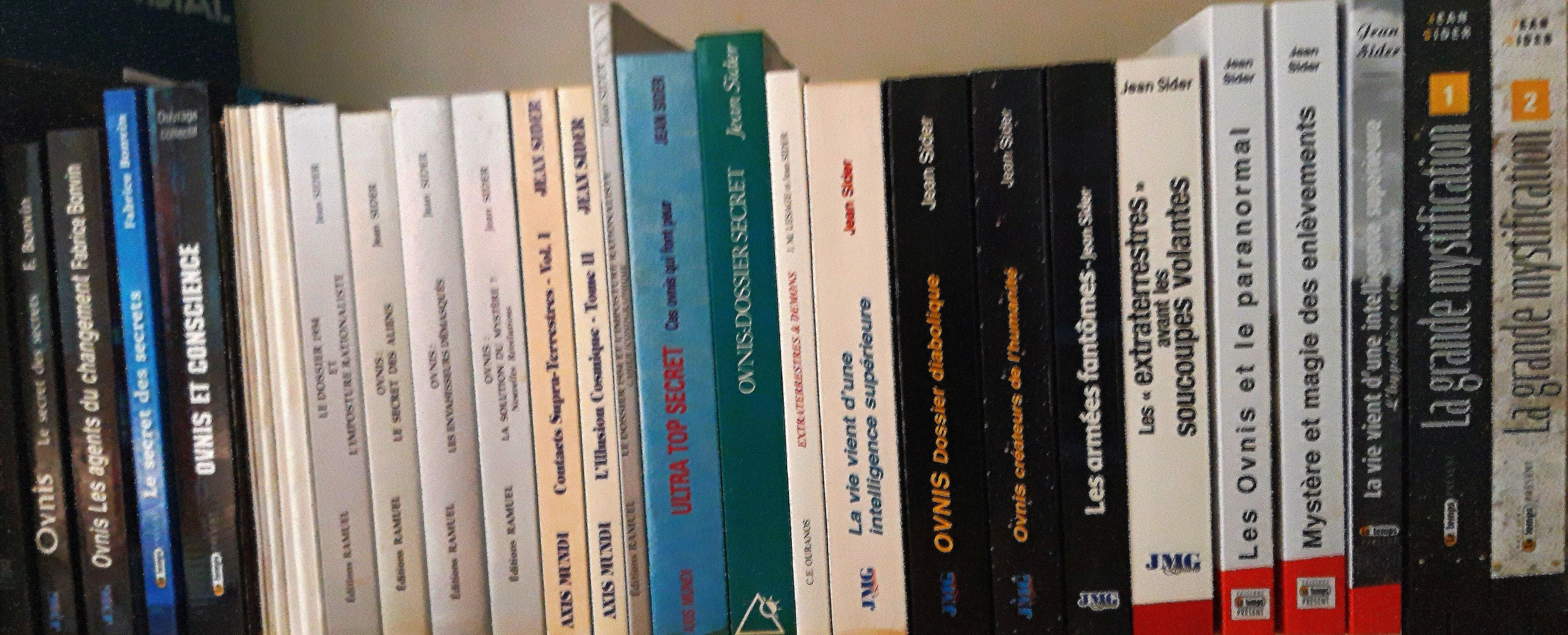 Oeuvres de Jean Sider et Fabrice Bonvin (ufologie).